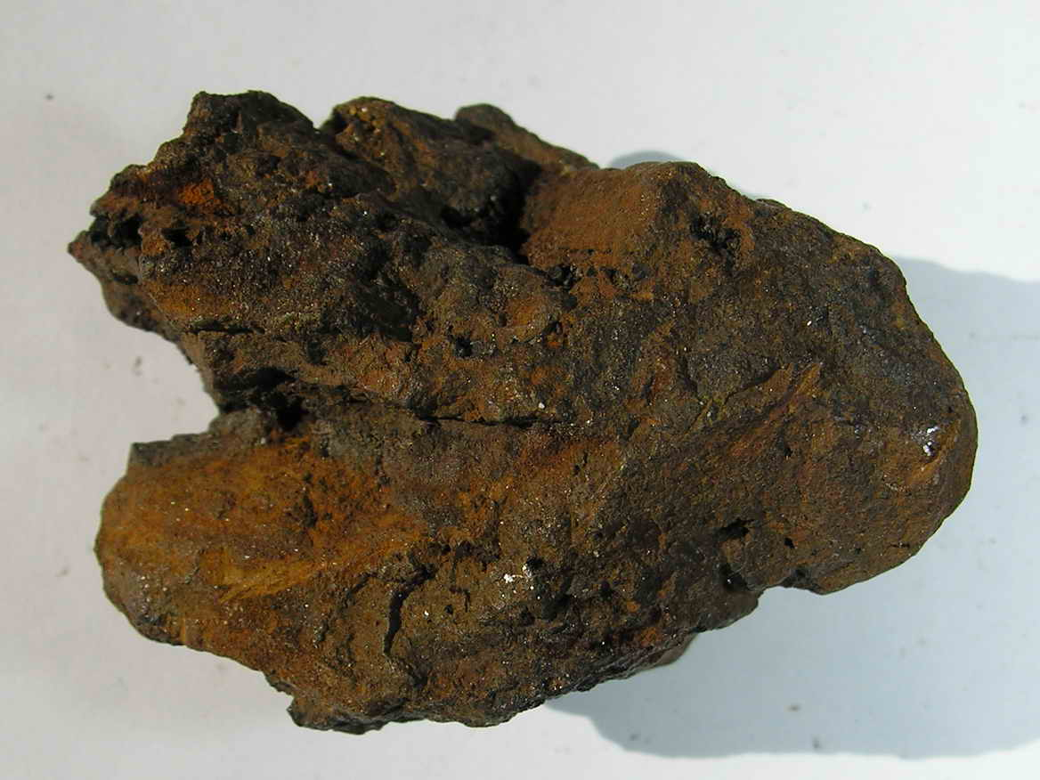 Limonita